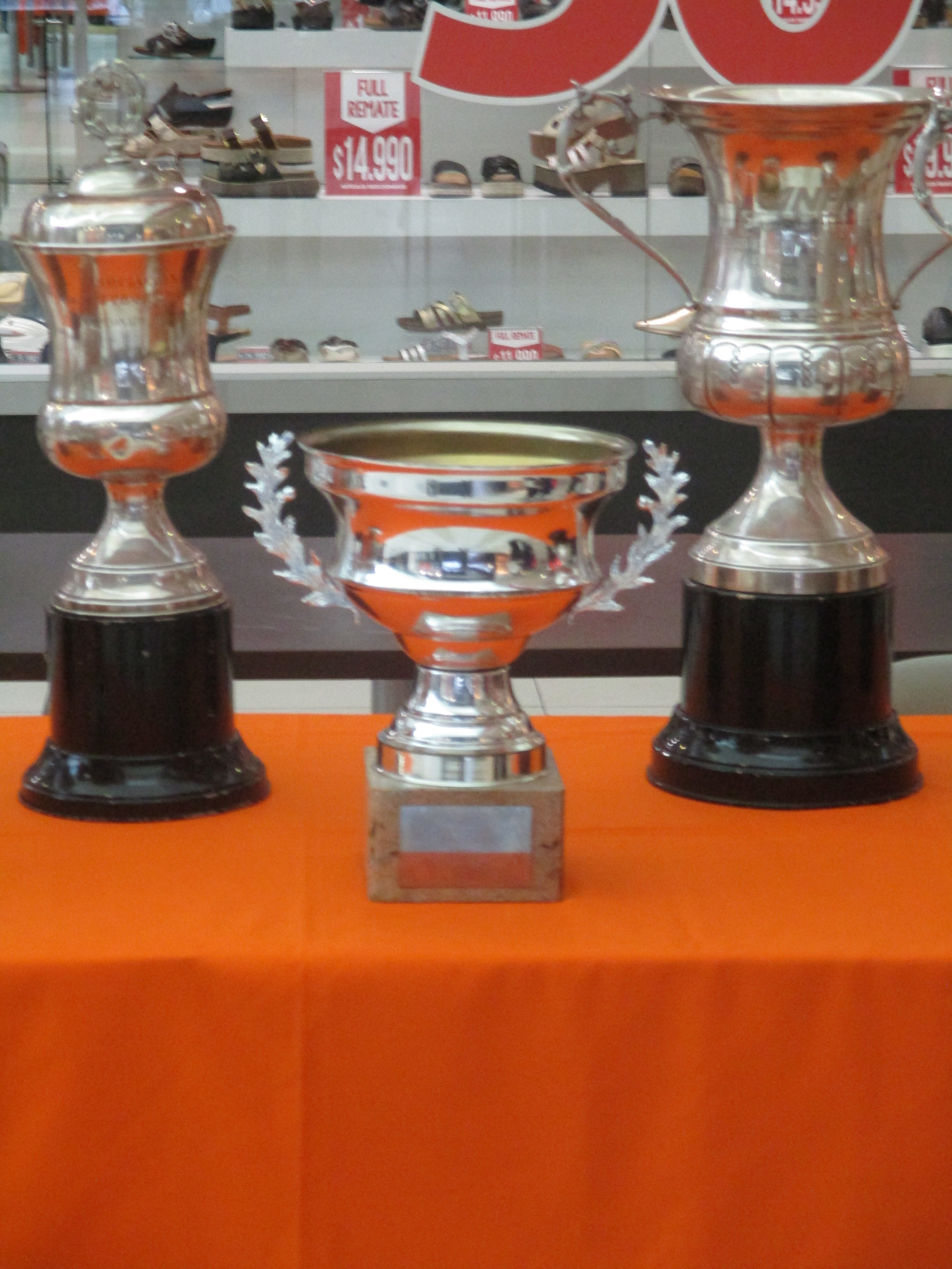 Trofeo de Cobreloa obtenido en el año 1992